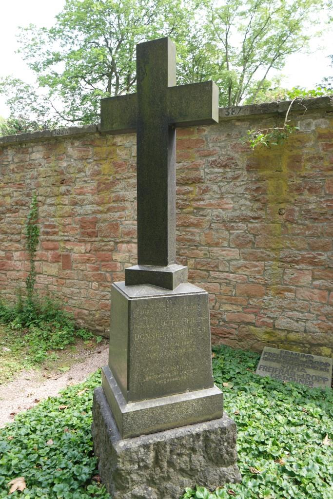 Grab des Malers und Kunstschriftstellers Otto Philipp Donner von Richter (1828-1911) auf dem Hauptfriedhof in Frankfurt am Main